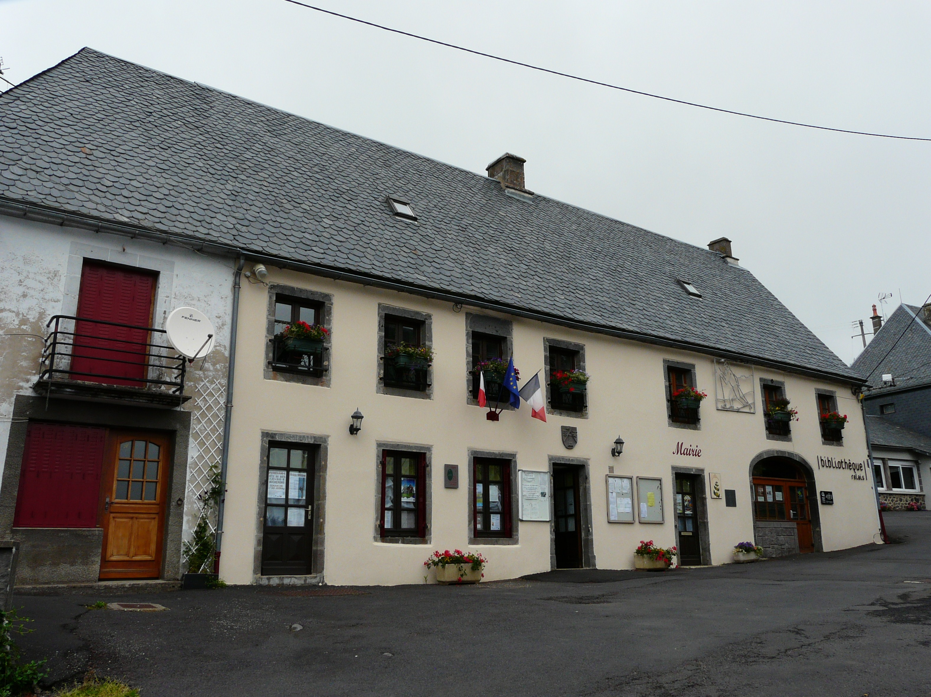 La mairie de Picherande, Puy-de-Dôme, France.